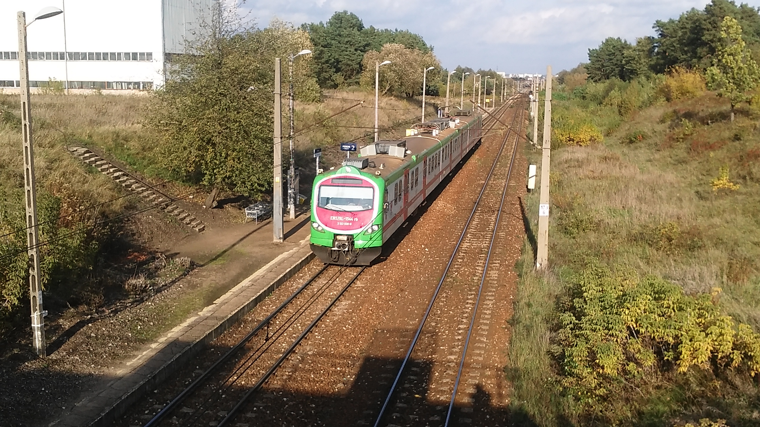 Przystanek kolejowy Białystok Wiadukt - pociąg osobowy Przewozów Regionalnych R 10328 relacji Białystok - Szepietowo